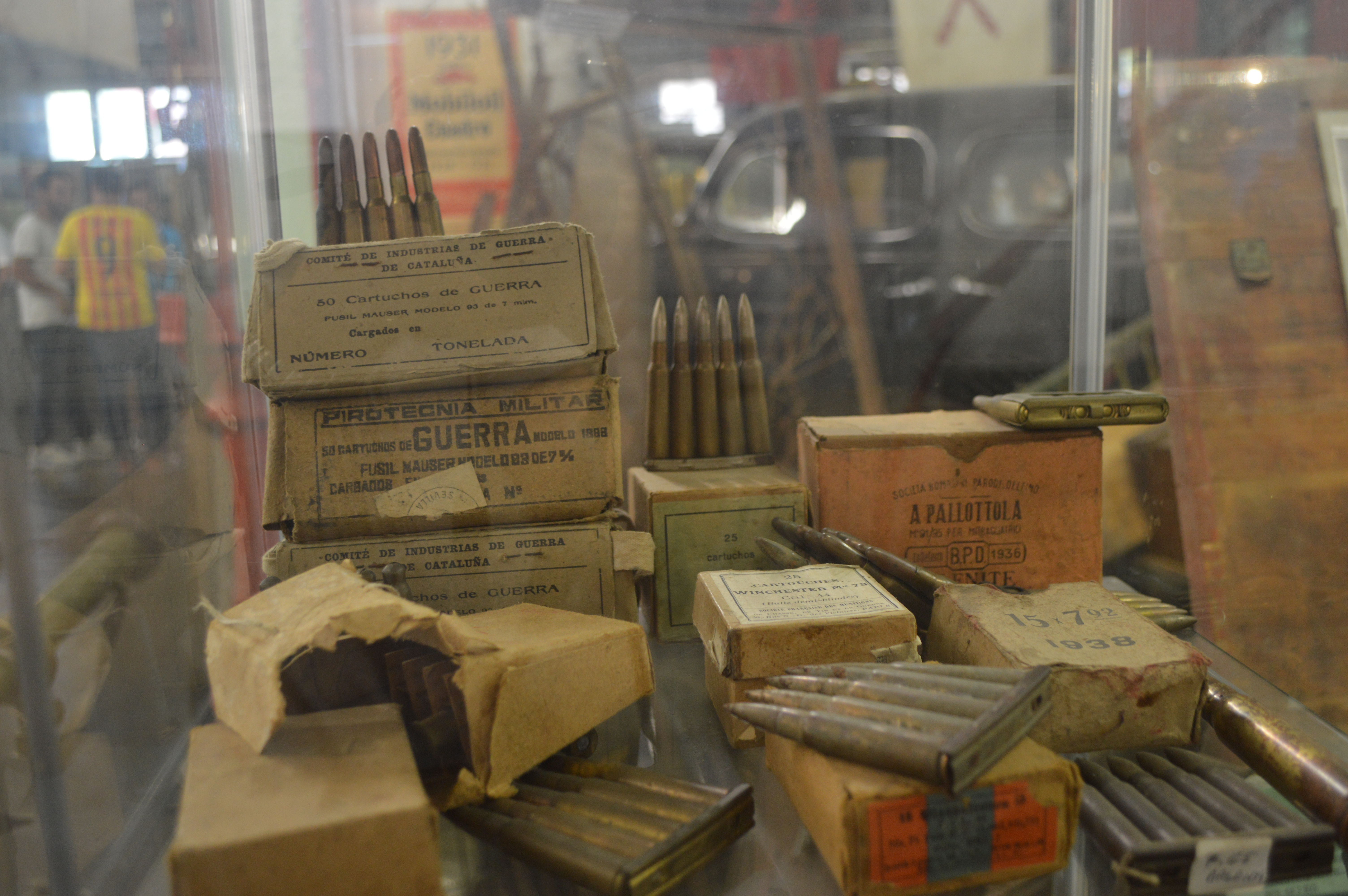 Diferent cartutxeria usada durant la Guerra Civil espanyola.